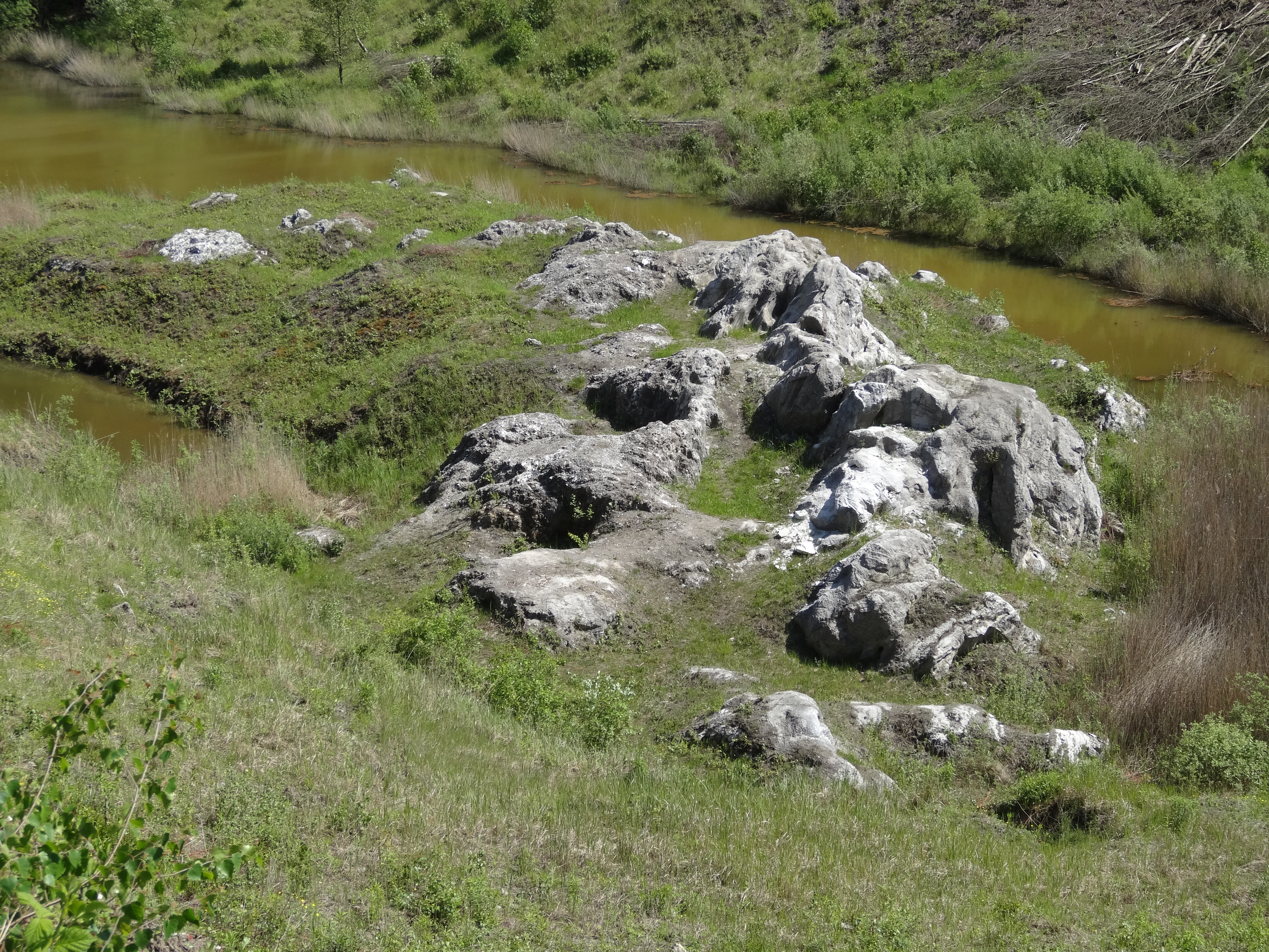 Bilder aus der Liether Kalkgrube